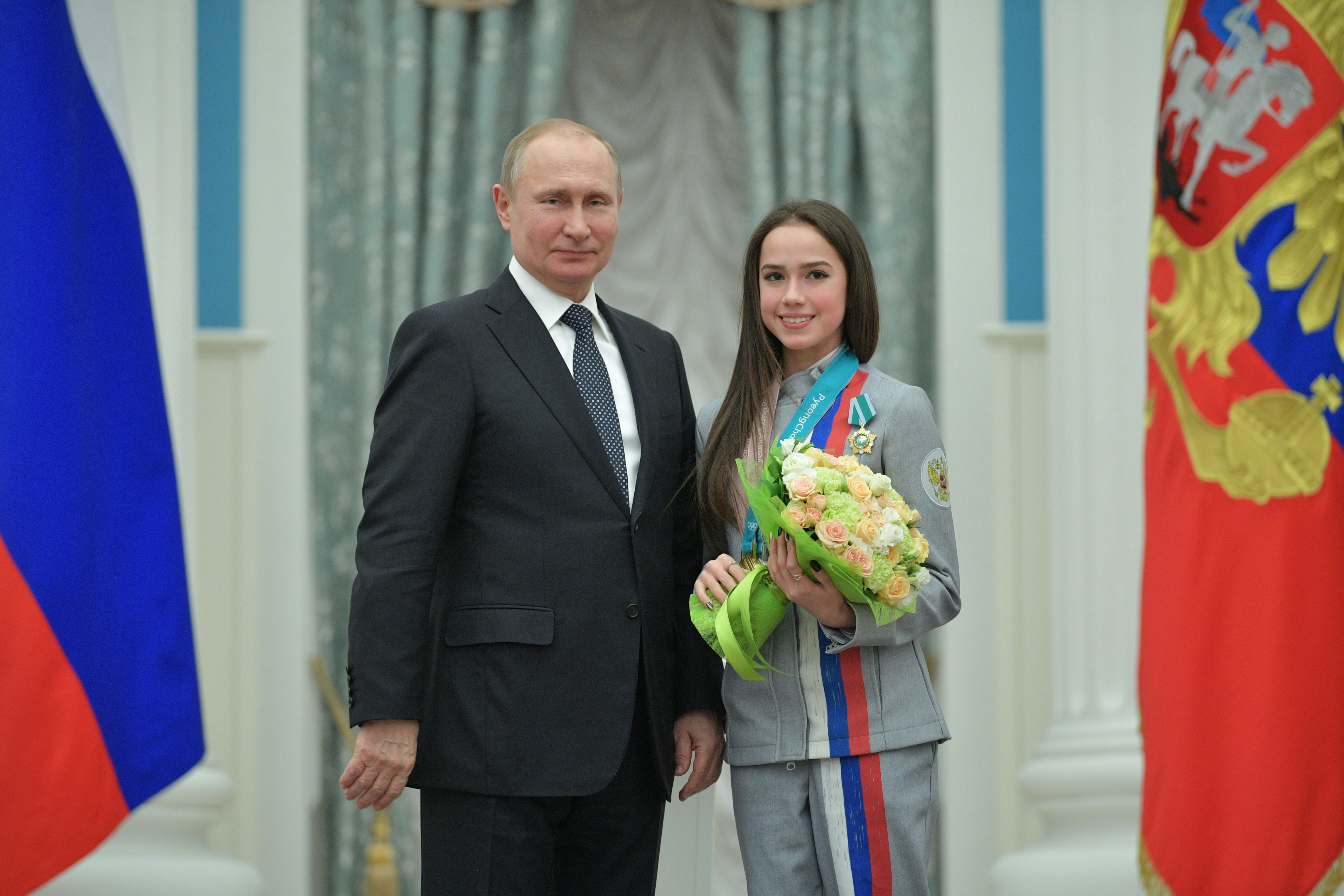 Президент России Владимир Путин с олимпийской чемпионкой по фигурному катанию на коньках Алиной Загитовой.